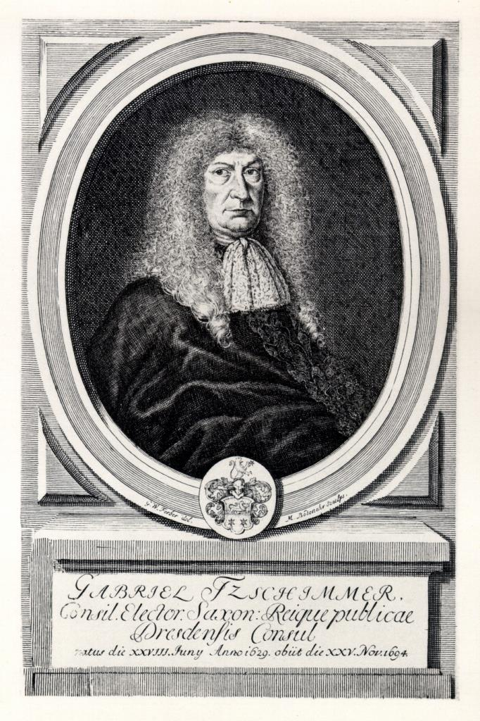 Kupferstich Gabriel Tzschimmer 1695 (G.W.Ferber del M.Bodenehr sculps.)